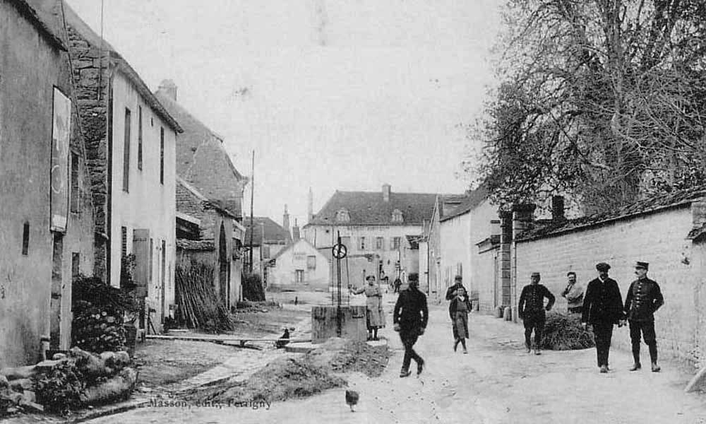 Rue centrale vers 1900